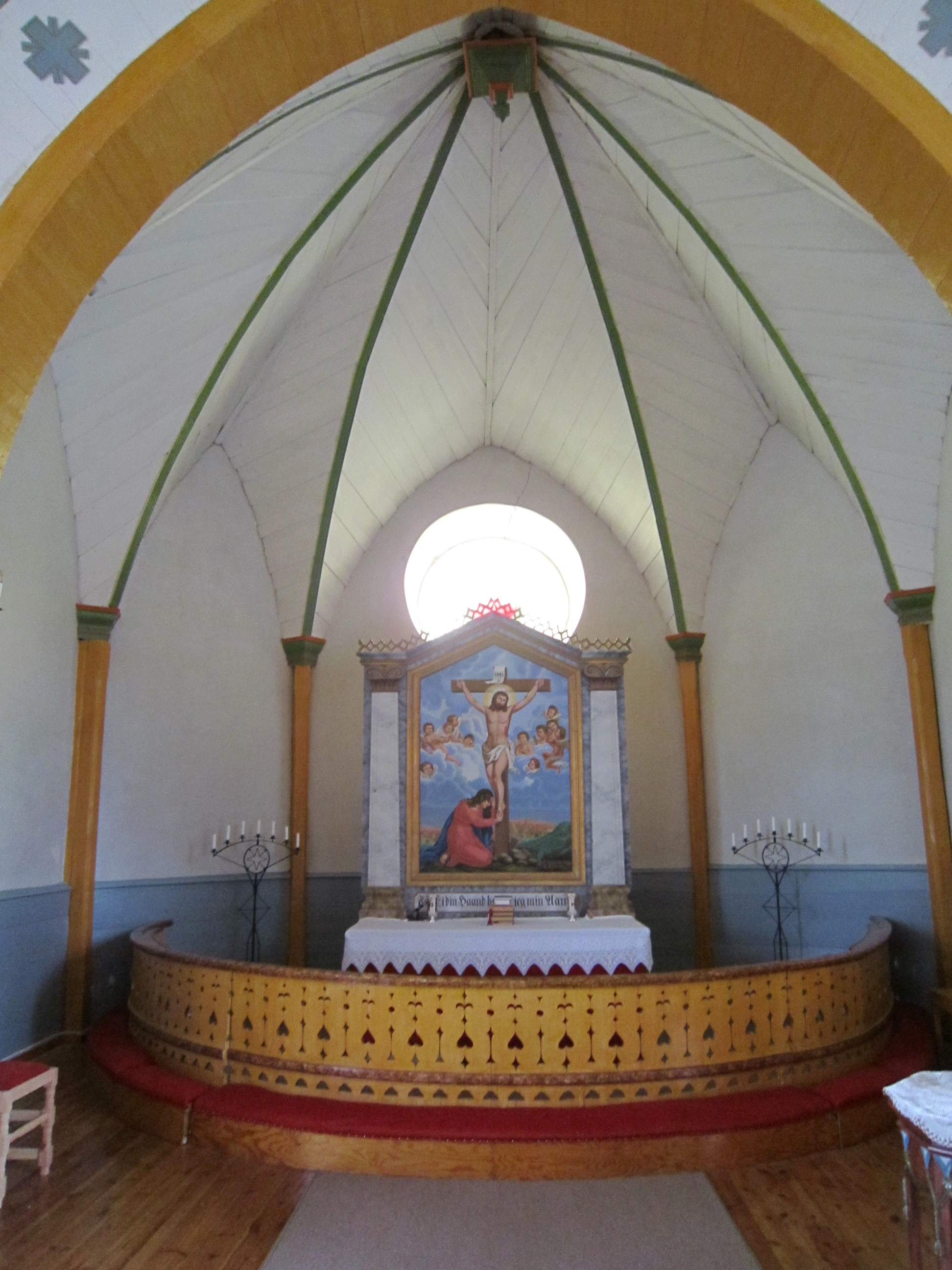 Koret i Narbuvoll kirke